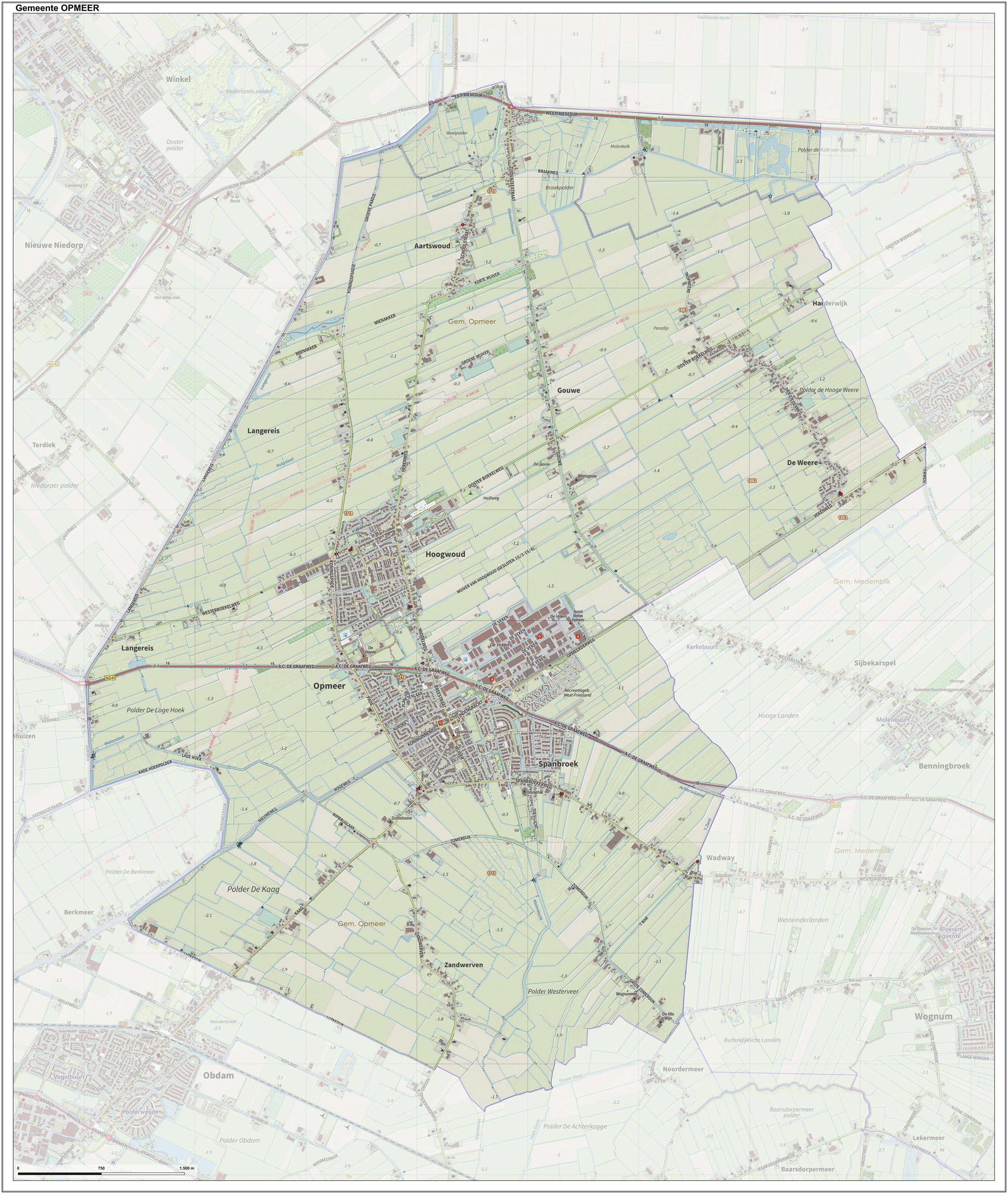 Topografische gemeentekaart. Resolutie: 400 pixels/km. Kaartbeeld samengesteld uit de open geodata van de Top10NL en Top25namen (Kadaster), Creative Commons-BY licentie. Gebouwvlakken uit open geodata BAG extract. Wegen uit de OpenStreetMap, OpenStreetMap community. Reliëfschaduw uit de Actuele Hoogtekaart AHN2. Samenstelling en kleurenschema: Jan-Willem van Aalst, met QGIS. Zie ook de Legenda.